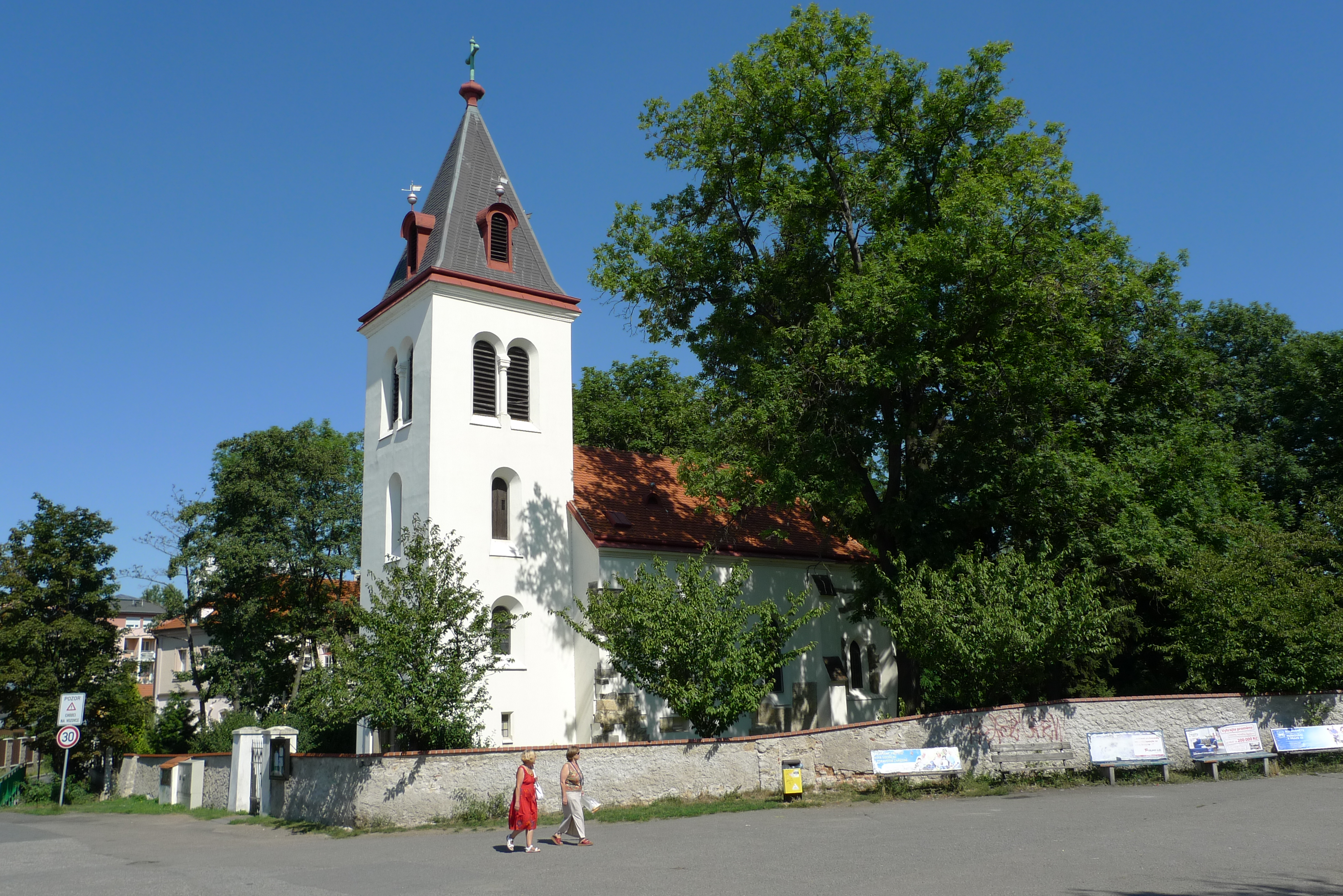 Kostel Narození Panny Marie v Praze 10-Záběhlicích